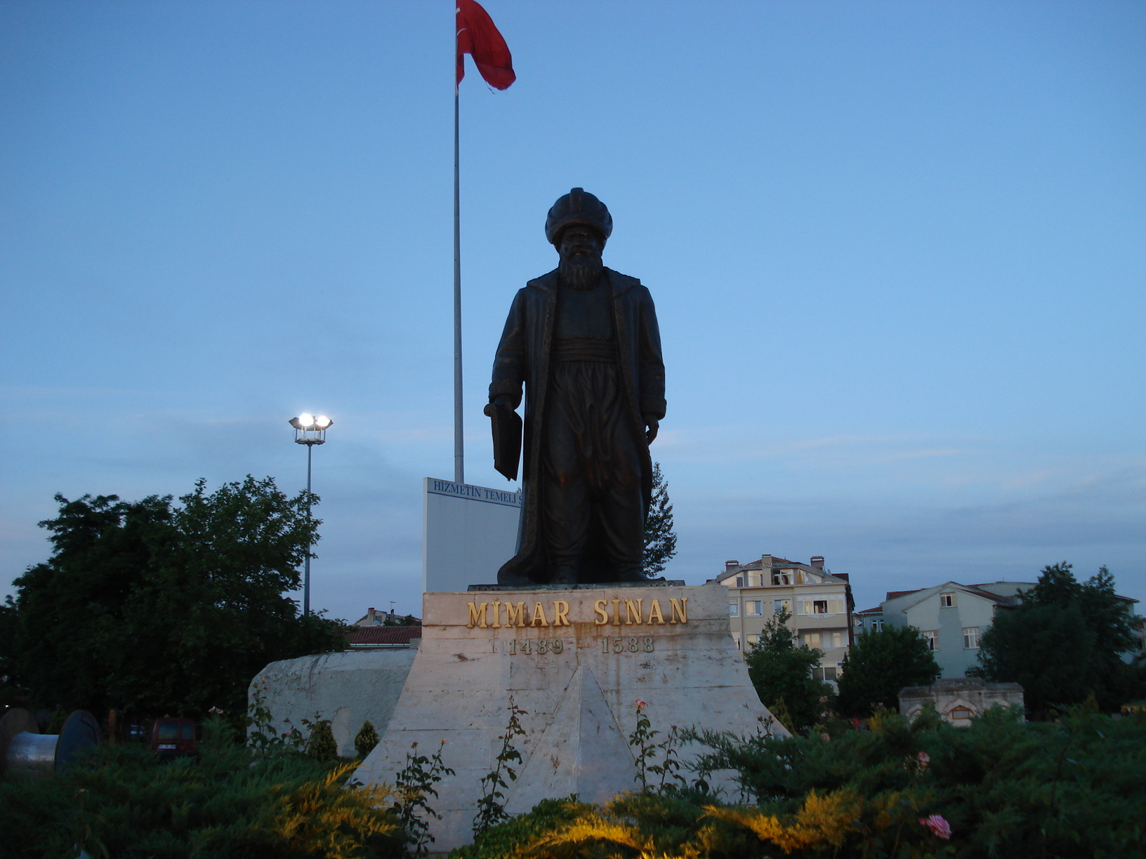 Mimar Sinan